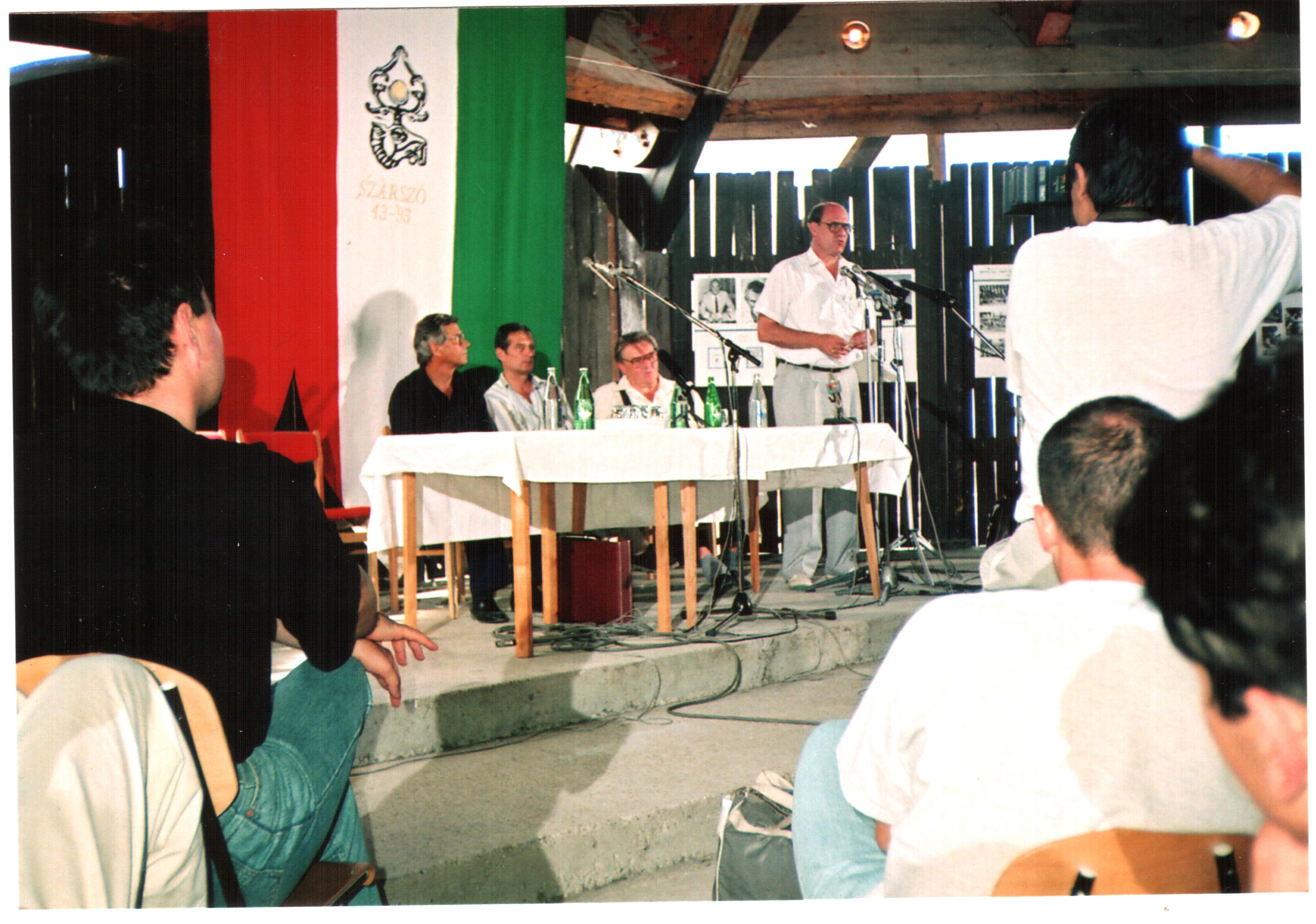 Kupa Mihály, Csurka István, Kósa Ferenc, Kiss Gy. Csaba. A felvétel 1993. augusztus hó 24- én készült Balatonszárszón. Püski Sándor az 1943 –as Szárszói Magyar Élet Konferencia 50. évfordulójának tiszteletére szervezte a találkozót. A találkozón jelen voltak: Püski Sándor, Csurka István (21,22,23, Bíró Zoltán (13), Szűrös Mátyás 28), Jobbágyi Gábor, Surján László (29), Tábori László (32), Bégány Attila (32,37), Elekes Andor (5,6,8,35) , Füzessy Tibor (14), 1943.. augusztus. 23.-28 –a között Püski Sándor Magyar Élet találkozót szervezett nemzeti kérdések megvitatására a Soli Deo Gloria balatonszárszói üdülőjében. Diákok, írók, politikusok, hírlapírók, egyesületi vezetők, munkás- és parasztfiatalok egyaránt a résztvevők között voltak. A vitákban részt vettek a KALOT, az EMSZO és a Hivatásszervezet tagjai is. A megbeszélések témája az 1939 óta tartó világháború., a magyar. nép állapota és a magyar nemzet háború utáni jövője. Az ismertebb előadók és fölszólalók: Németh László (1901-75), Kodolányi János (1899-1969), Veres Péter (1897-1970), Erdei Ferenc (1910-71), Karácsony Sándor (1891-1952), Féja Géza (1900-78), László Gyula (1910-98), Szabó Pál (1893-1970), Jócsik Lajos (1910-80), Nagy István (1904-77), Szabédi László (1907-59). A legelevenebb érdeklődést Erdei Ferenc és Németh László vitája váltotta ki. Erdei az esélyek alakulásából már kirajzolódni látszó 'szocializmus', utóbbi a kapitalizmus és a szocializmus közötti 'harmadik út' mellett érvelt. A résztvevők döntő többsége az utóbbival rokonszenvezett. Források: Szárszó '93 Az 1993 évi szárszói tábor előadás és megbeszéléssorozata Püski, Budapest, 1993 Borbándi Gyula: A magyar népi mozgalom. New York, 1983. (és Bp., 1989:336.) - Szárszó 1943. Budapest, 1983. - Püski Sándor: Könyves sors - magyar sors. Budapest, 2002. Őrző a strázsán Somodi István: Szárszó – Modell vagy emlék?